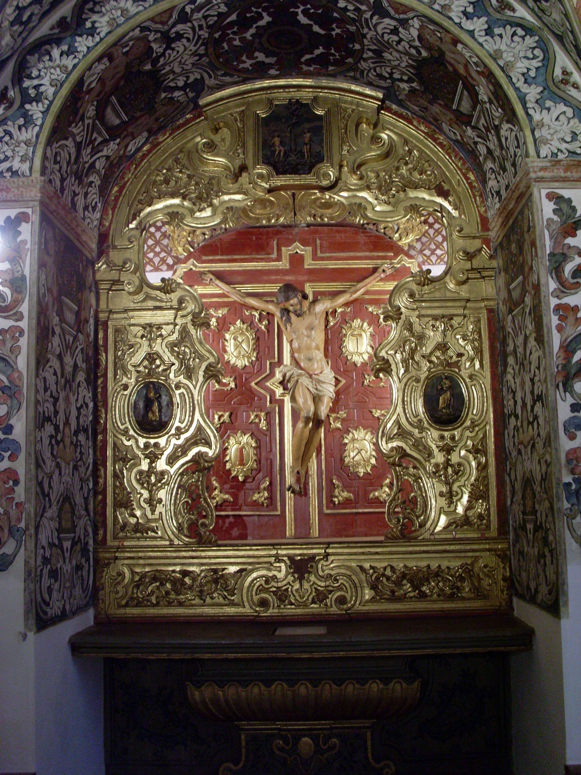 Retablo de la iglesia de los Descalzos de Écija.